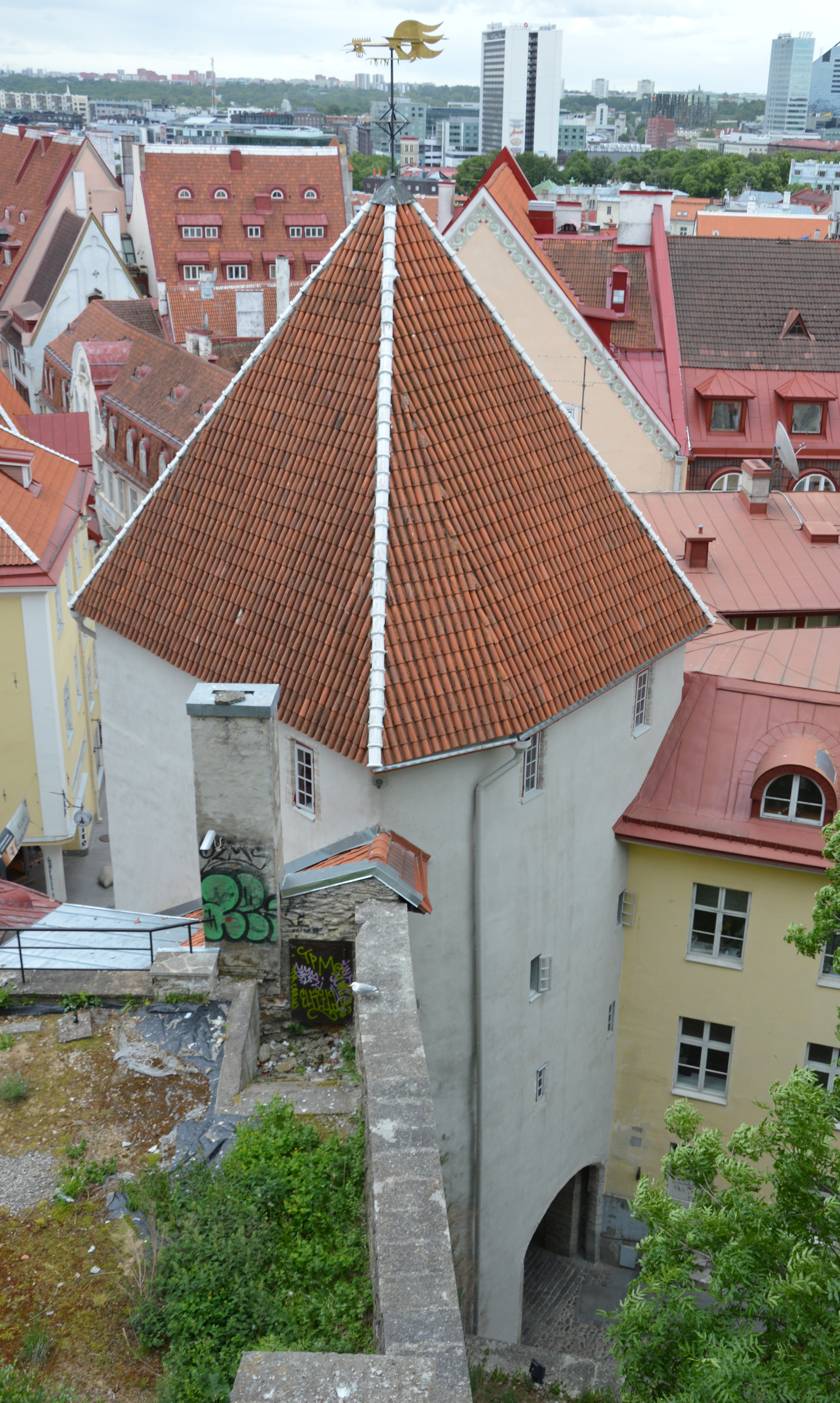 Torturm am Langen Domberg 2018